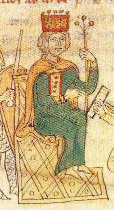 Jindřich VI. štaufský